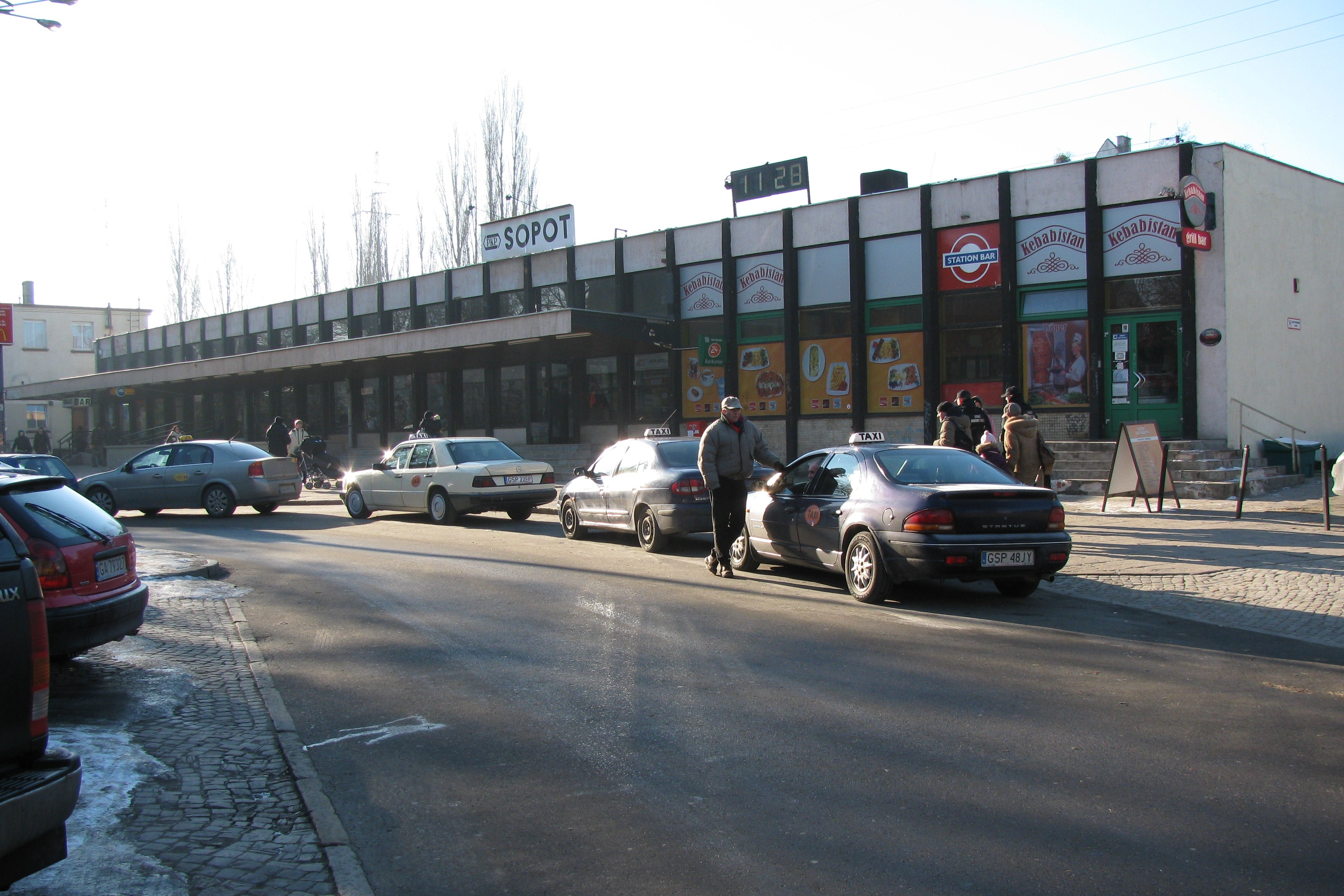 Sopot, stacja kolejowa. W oczekiwaniu na przebudowę.